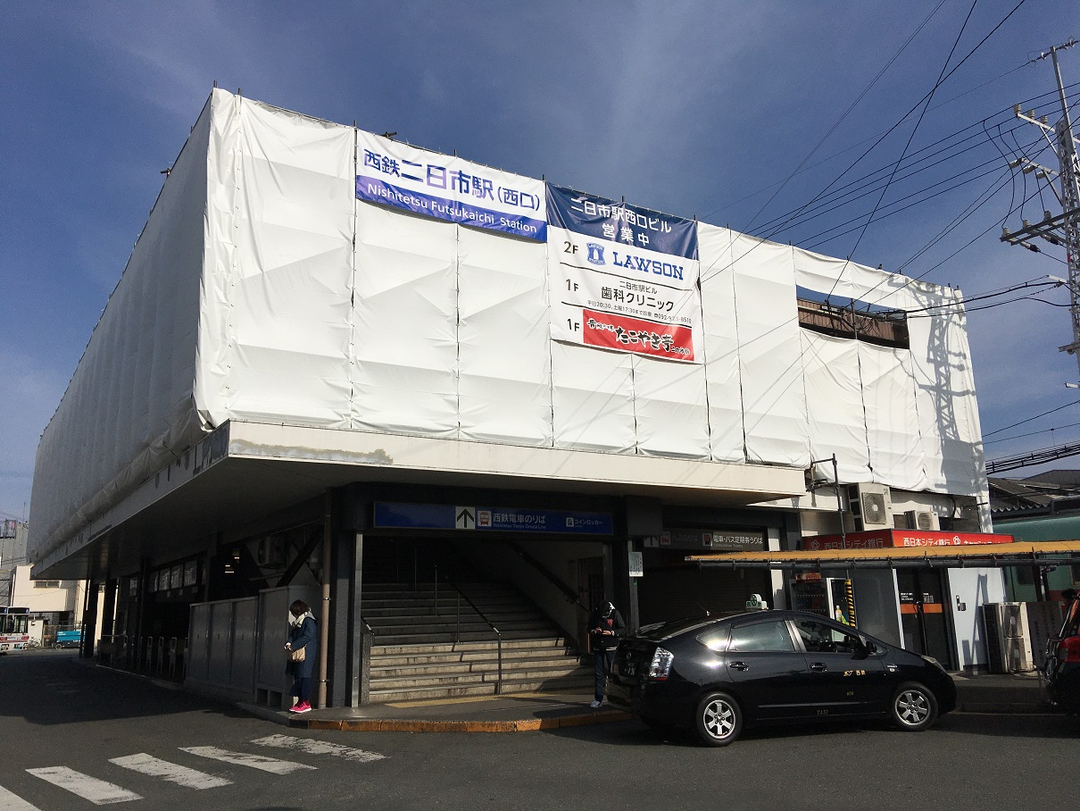 西鉄二日市駅西口駅舎